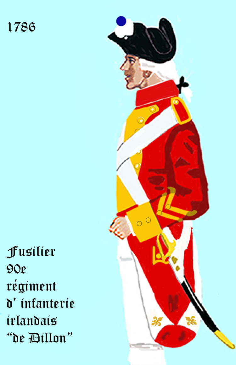 Uniform eines königlich französischen Infanterie-Regiments gemäß Dekret von 1776, Änderungen von 1786. - Entnommen und überarbeitet aus: „LES UNIFORMES ET LES DRAPEAUX DE L'ARMÉE DU ROI“ Marseille 1899.